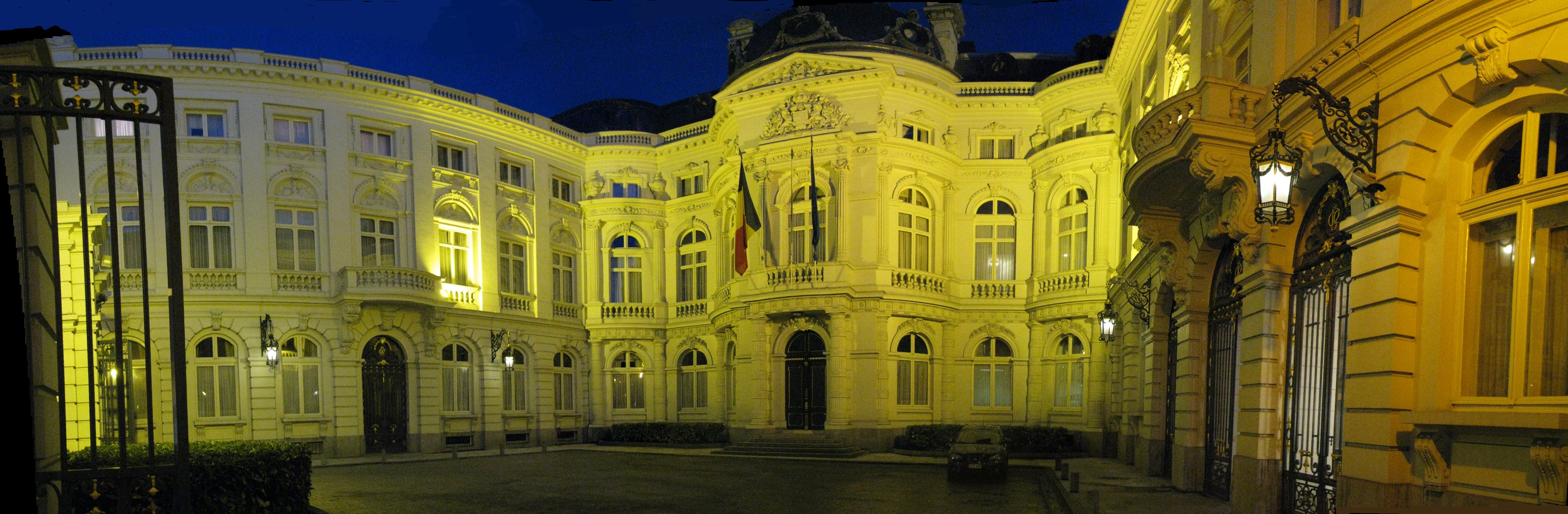 Cours des Comptes